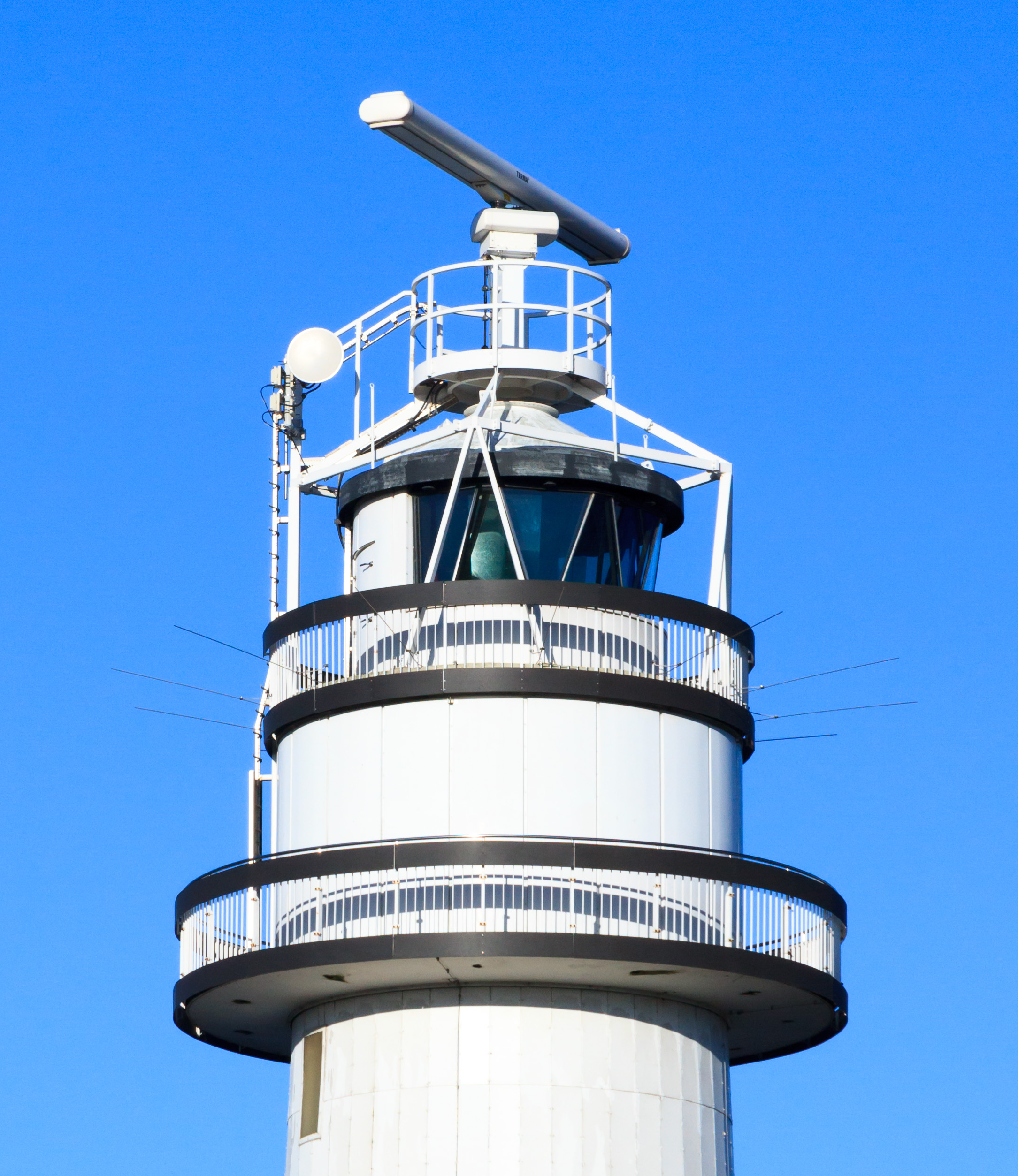 Die Laterne mit der 2013 installierten Radaranlage.